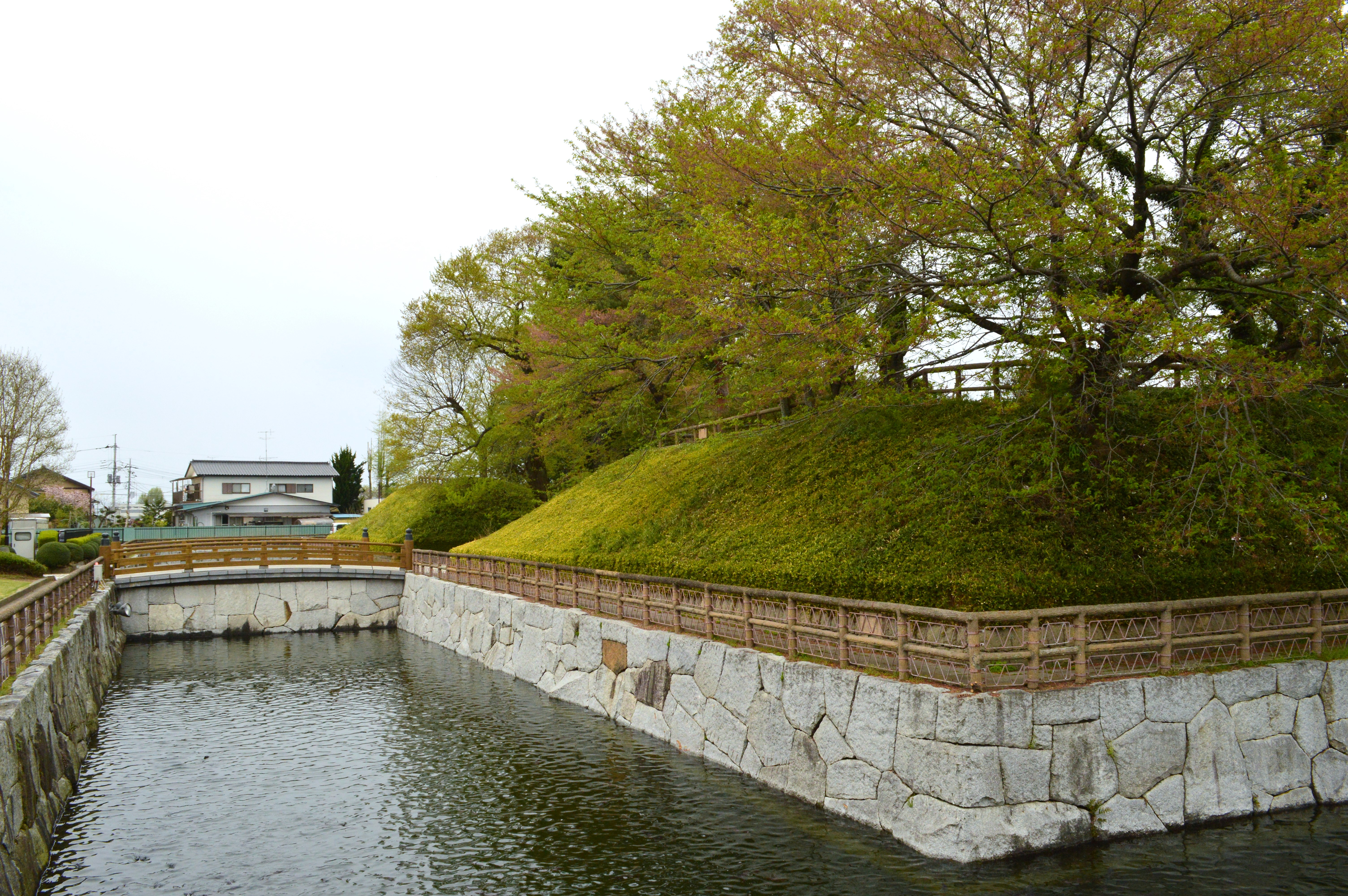 壬生城 本丸入り口